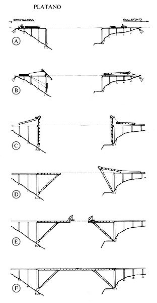 Séquence de construction de la travée du pont à béquilles de Platano.